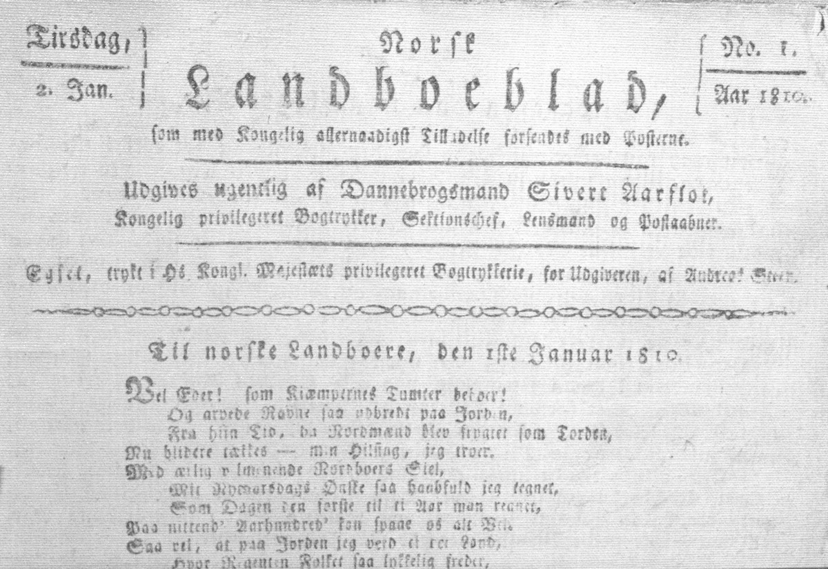 Morsk Landboeblade (1810), norsk avis.